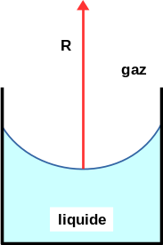 rayon de courbure du ménisque dans le cas d'un liquide mouillant la paroi du tube